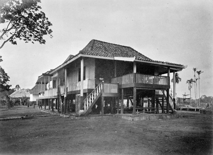 Foto. Deze foto is gemaakt tijdens de Sumatra Expeditie van 1877-1879. Landschappen uit de afdeeling Rawas.. Controleurswoning te Soeroelangoen, district Rawas, Sumatra